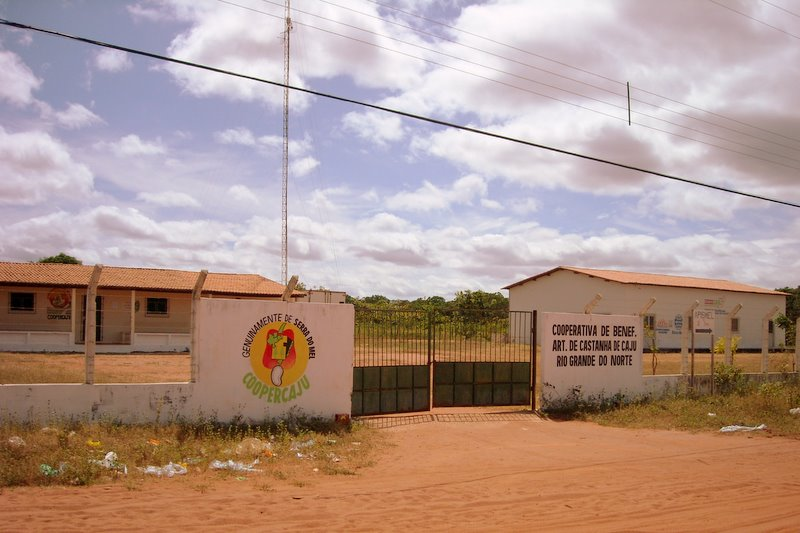 Prédio da Coopercaju - Cooperativa de Beneficiamento de Castanha de Caju